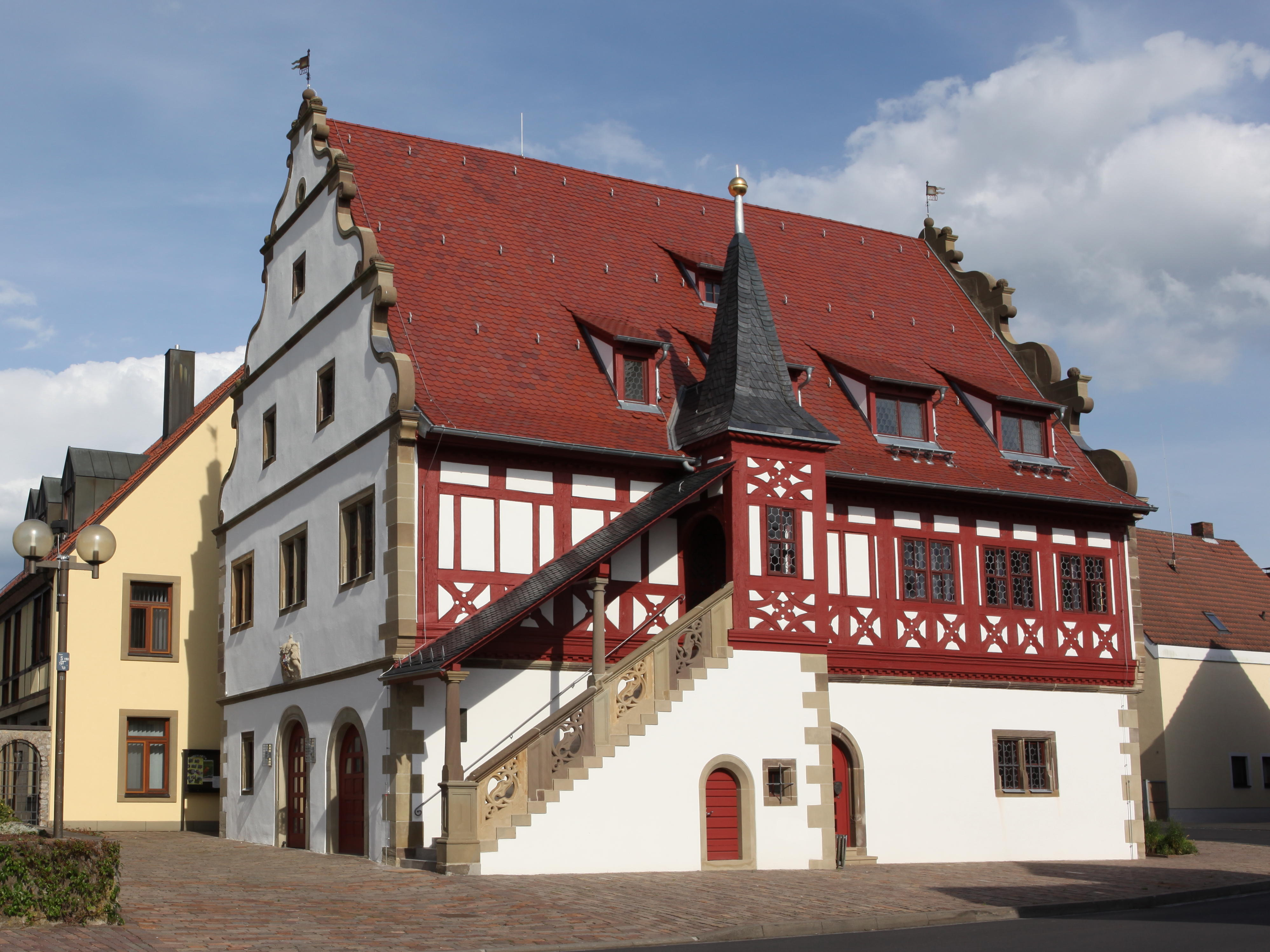 Altes Rathaus in Grettstadt, Landkreis Schweinfurt